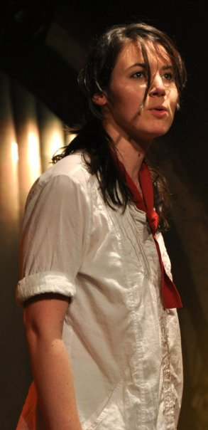 נעה בירון מתוך ההצגה "שרופים" בתיאטרון הערבי-עברי